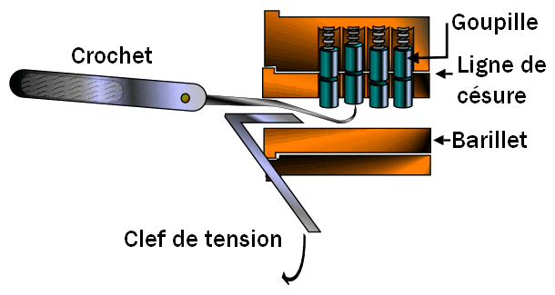 Barillet à goupilles - crochetage